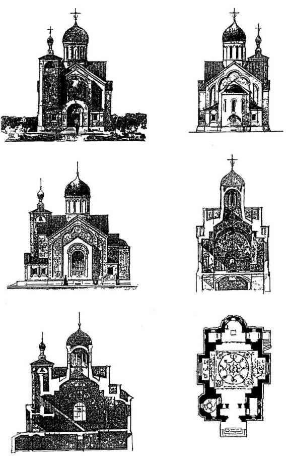 Проект храма при дипломатическом представительстве России в Сеуле